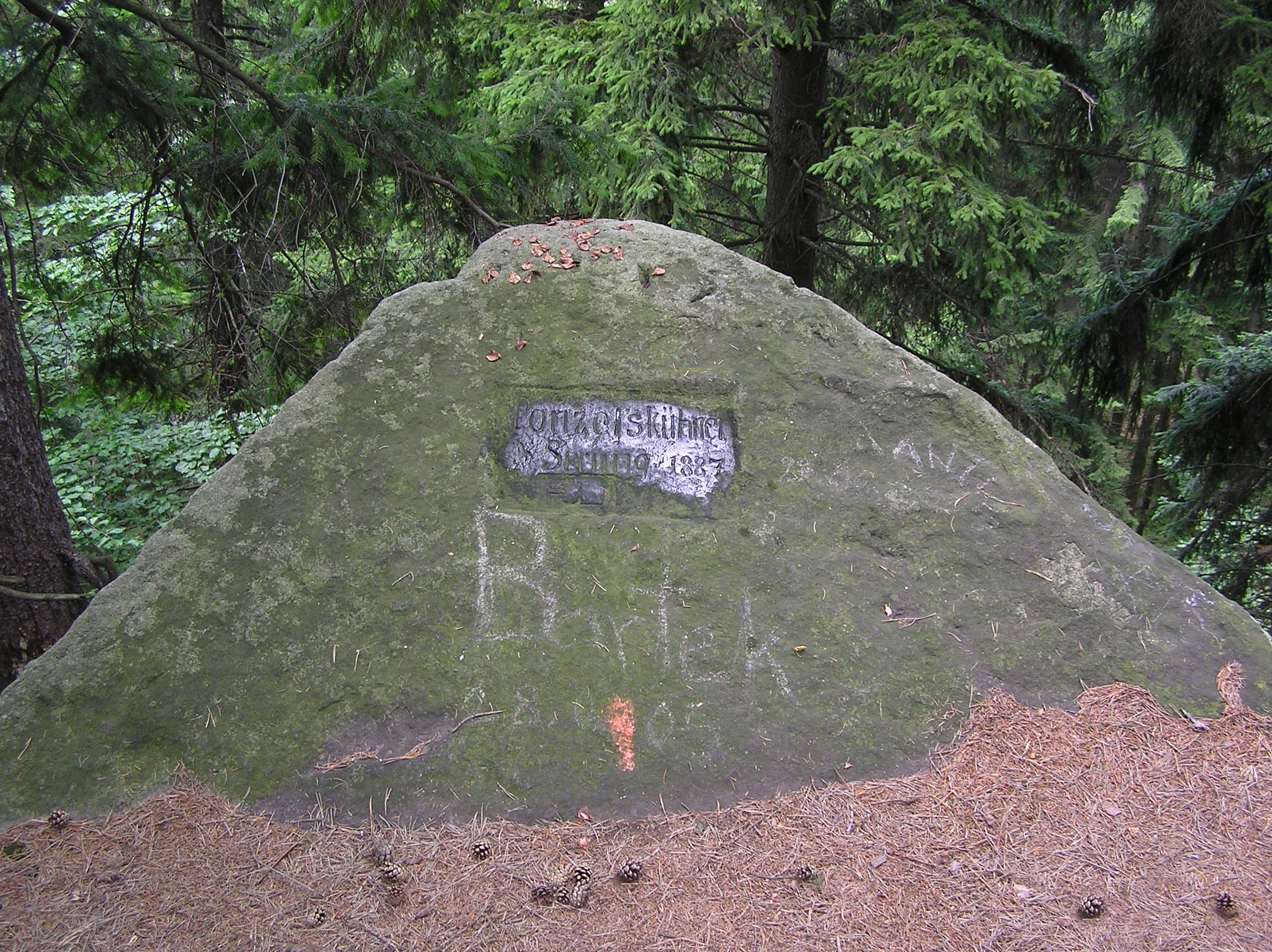 In Gestein gemeisselte Inschrift "Ponzels kühner Sprung, 1887", darunter Relief einer ähnlich eines Richtungsweisers nach links weisenden Hand zur Erinnerung an den wagemütigen Absprung eines gewissen August Ponzel (oder Ponzel Karle [1]?) von einer Felsenkante am Nesselgrunder Steinberg (704 m), den der Betroffene - abgesehen von einigen Kratzern - unversehrt überstand, da der freie Fall von den in der Tiefe stehenden Bäumen abgebremst wurde [2]. Der Steinberg (poln. Kamienna) erhebt sich westlich von Nesselgrund (Pokrzywno) im Gemeindegebiet der Stadt Habelschwerdt (Bystrzyca Kłodzka) an den östlichen Ausläufern des Habelschwerdter Gebirges (Góry Bystrzyckie), Niederschlesien, Polen.